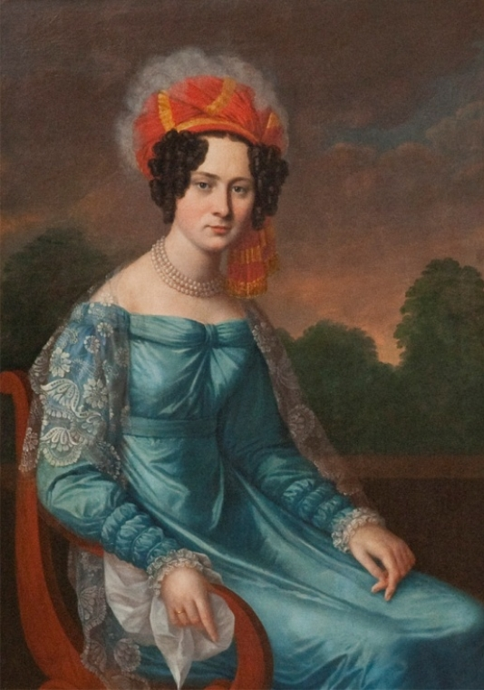 Графиня Екатерина Александровна Стройновская (6.08.1800—19.10.1867), ур. Буткевич, во втором браке Зурова.